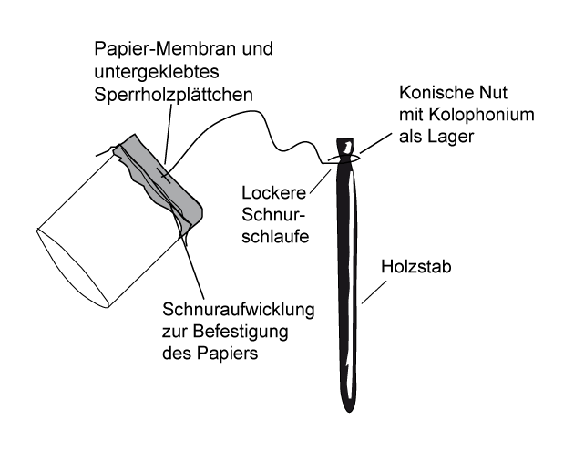 Zeichnung eines „Zikade“, „Cigale“ oder „Toulouhou“ genannten Musikinstruments, mit dem die Gesänge von Singzikaden nachgeahmt oder zumindest schnarrende Geräusche erzeugt werden. Das Instrument wird durch Herumwirbeln zum Klingen gebracht.